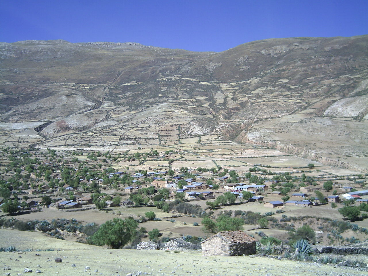 Pueblo de San Isidro de Carampa Vista panoramica del pueblo de Carampa Ayacucho - Peru